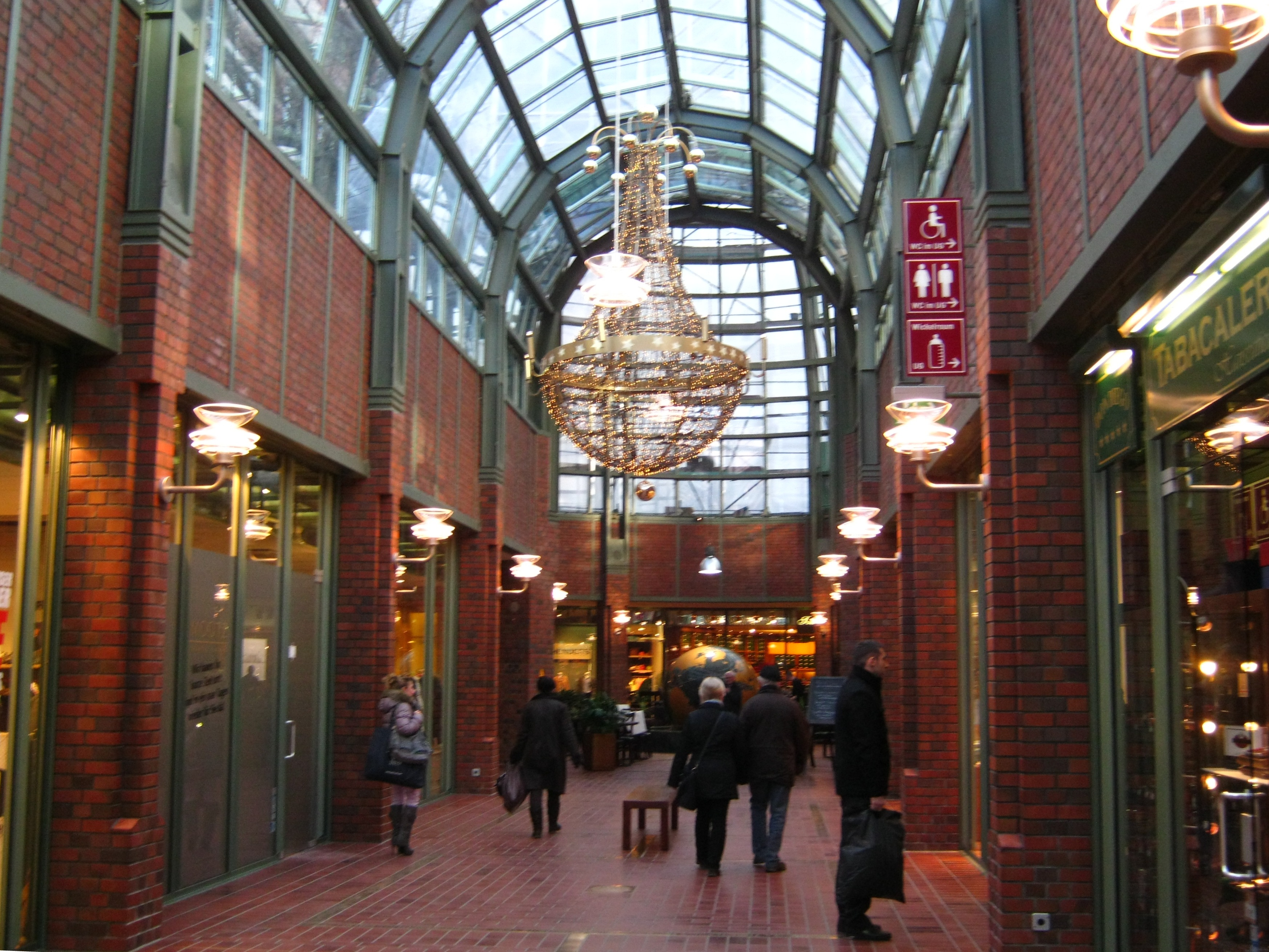 Ladenzeile im Einkaufszentrum Hanse-Viertel in Hamburg-Neustadt.